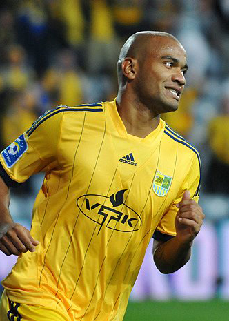 Родриго Моледо